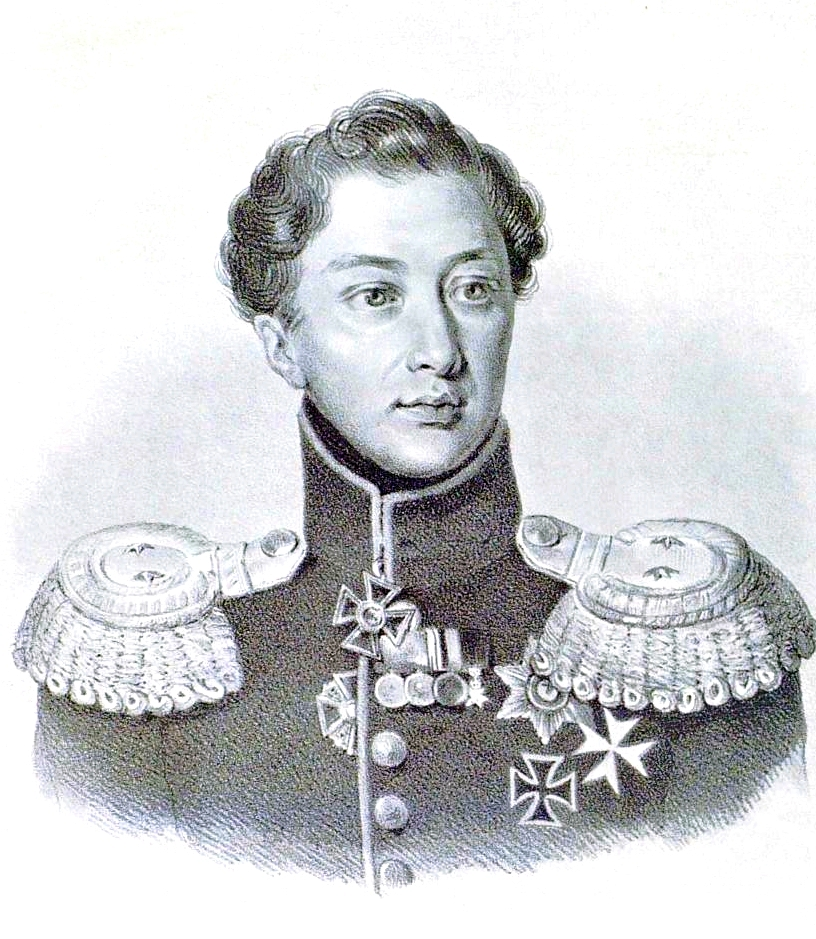 Апраксин, Степан Фёдорович (1792)